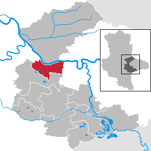 Aken (Elbe) in Sachsen-Anhalt, Landkreis Anhalt-Bitterfeld